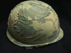 M1